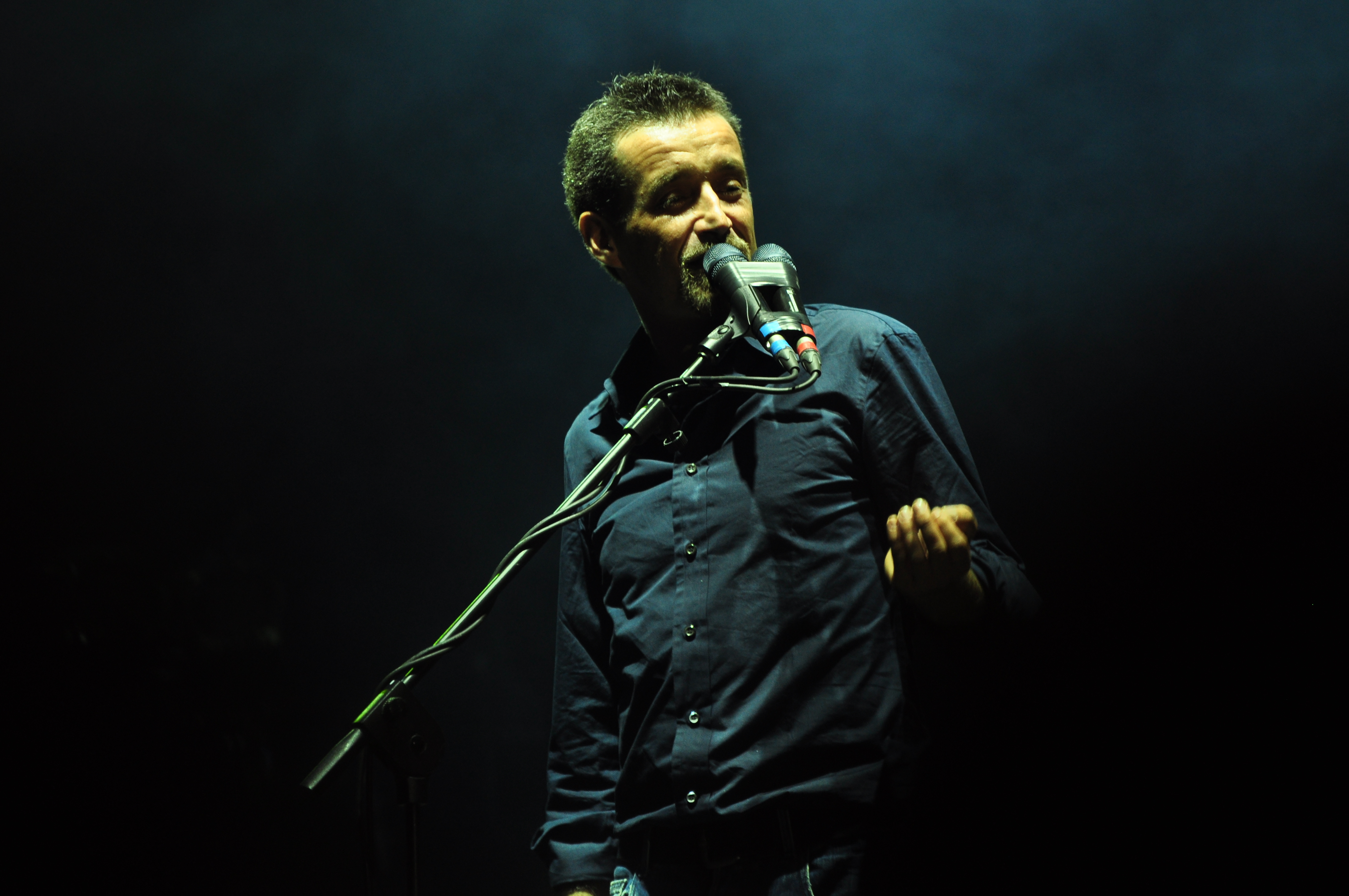 Daniele Silvestri live @ Ippodromo delle Capannelle, Roma, 27/7/2010